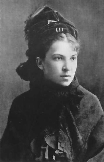 Мария Гавриловна Савина